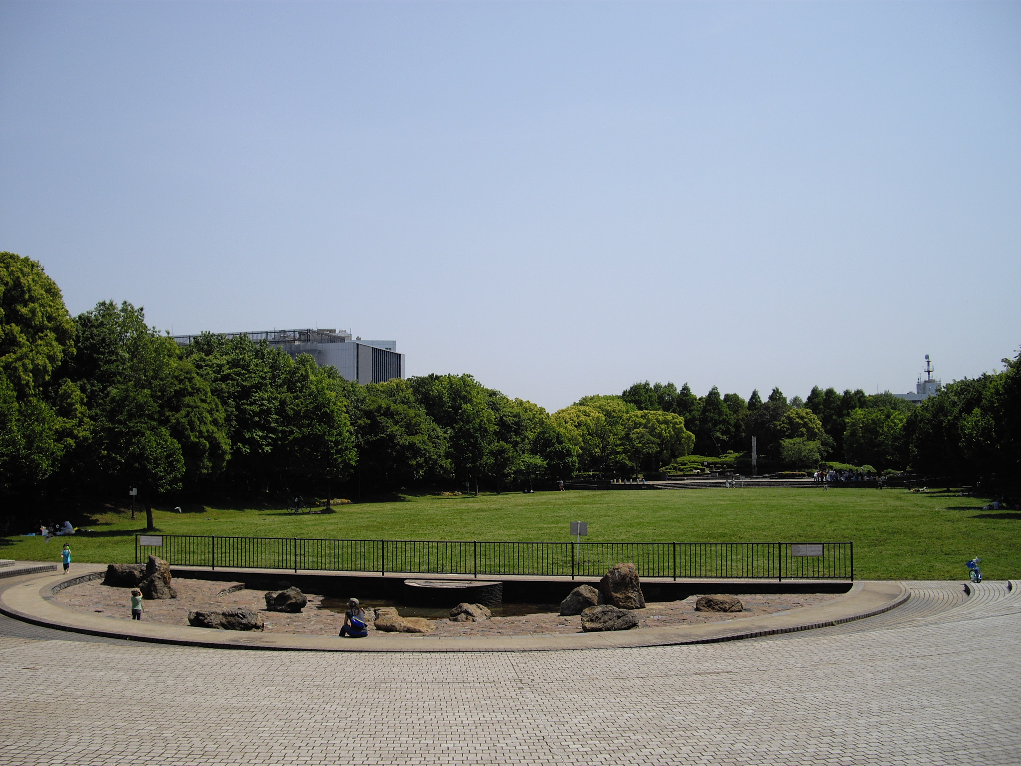 大田区立平和の森公園